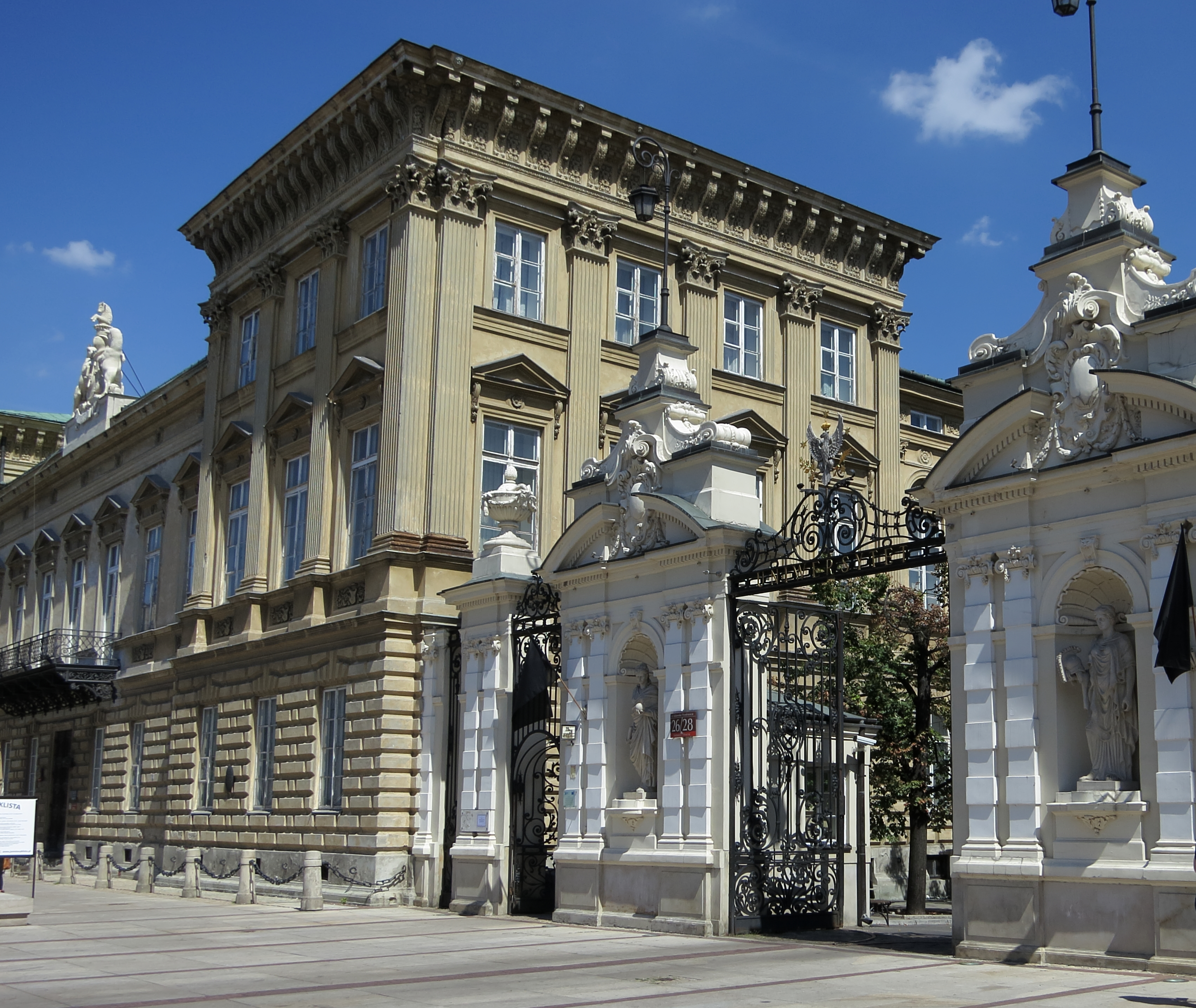 Warszawa, Pałac Uruskich